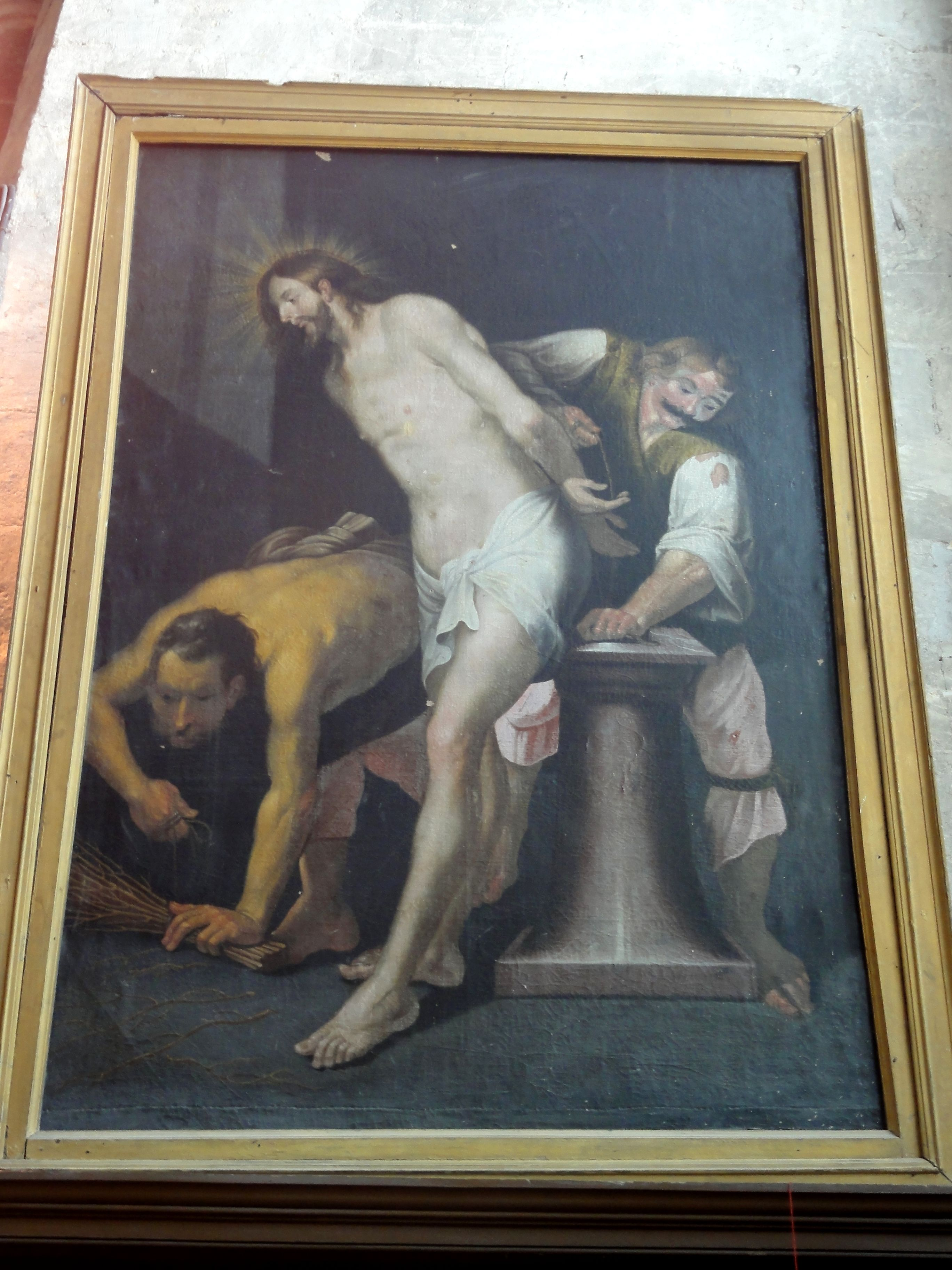 La Flagellation de Jésus, par Quentin Varin (1570-1634).